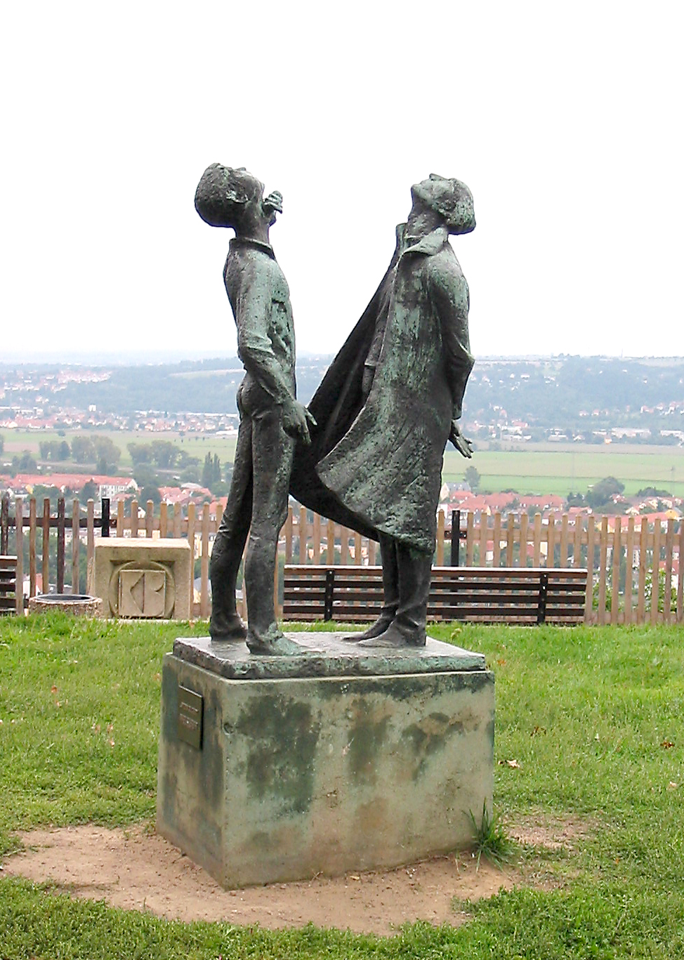 Bronze Die Sterngucker vor der Volkssternwarte Adolph Diesterweg Radebeul, von Walter Howard